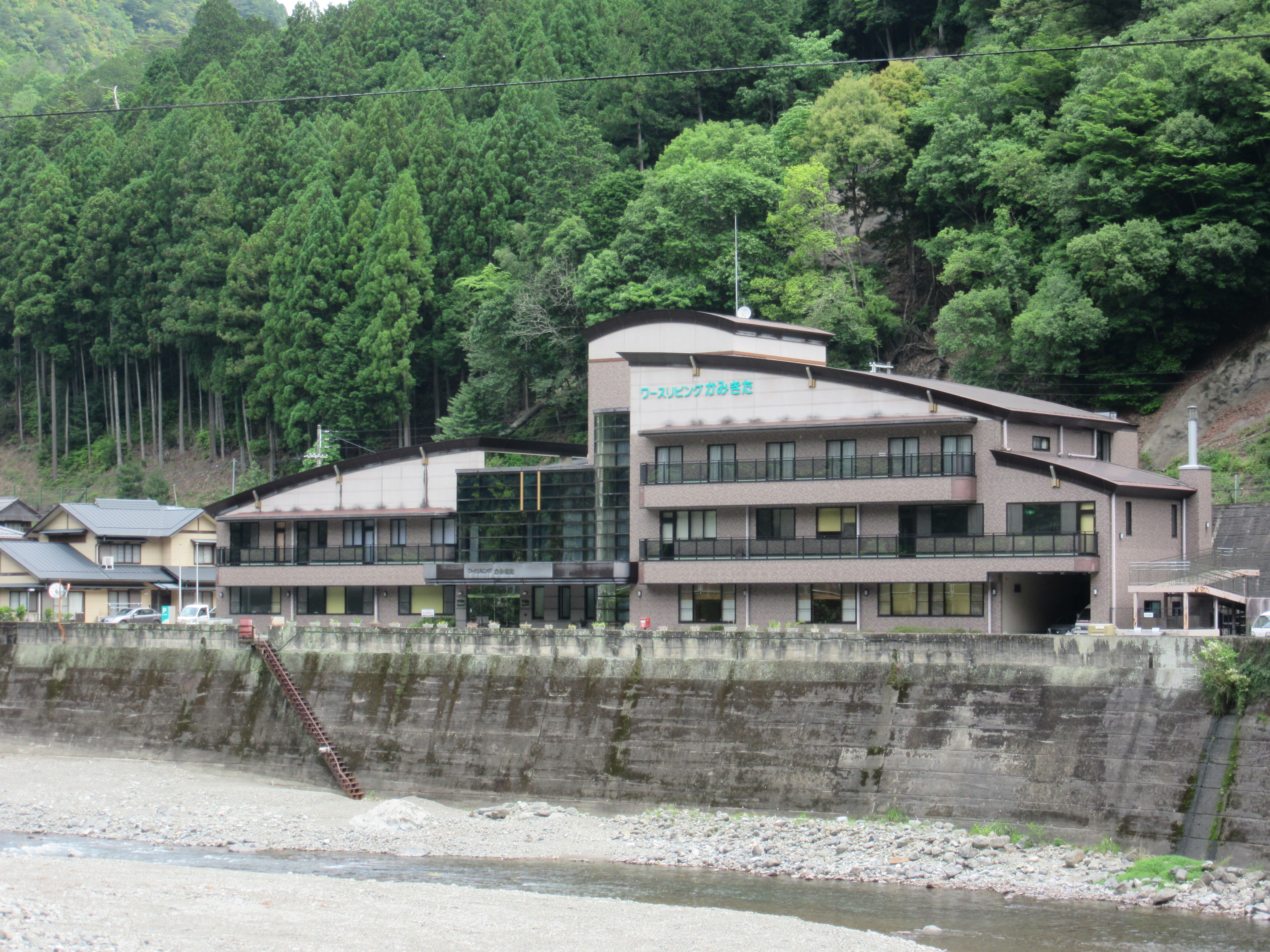 上北山村河合・上北山診療所